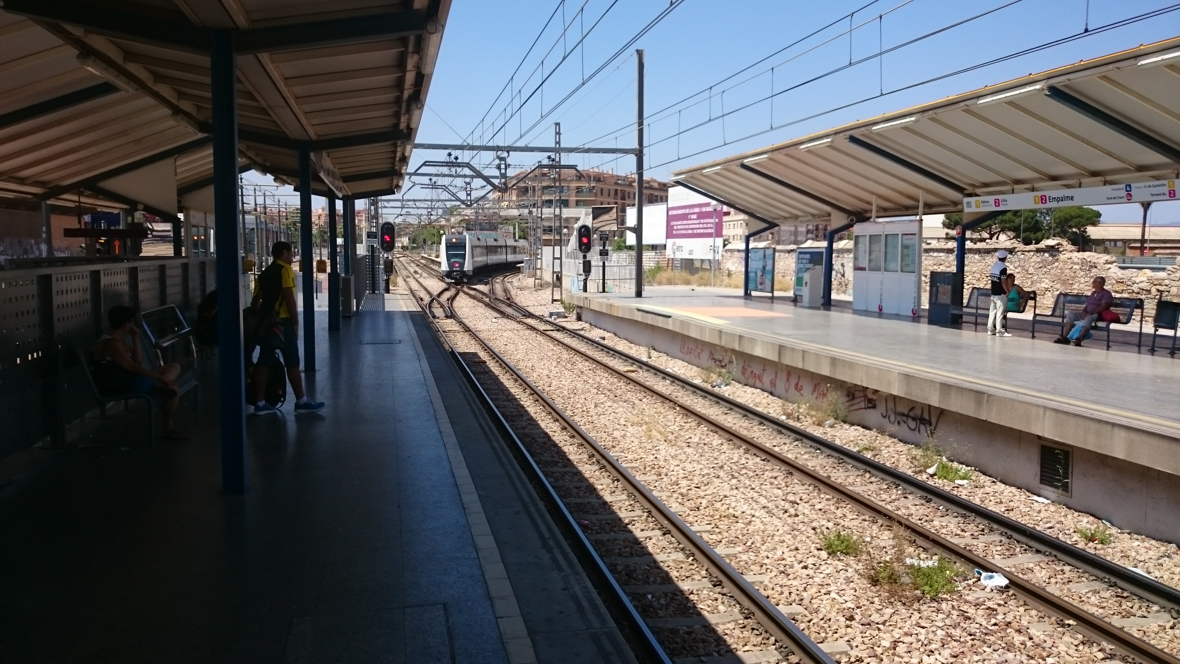 Aankomende metrostel in Empalma